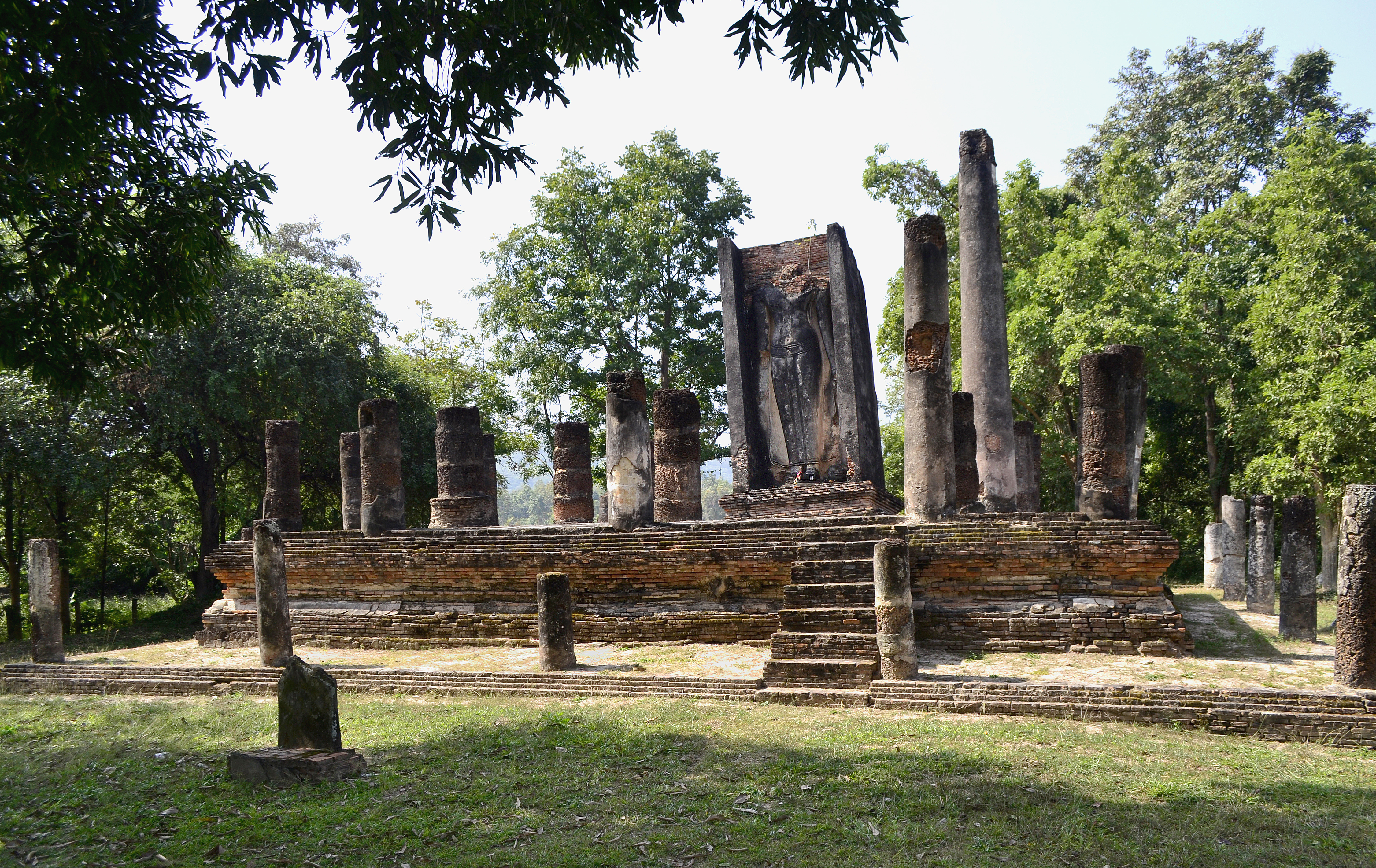 Wat Phra Yuen im Geschichtspark Sukhothai